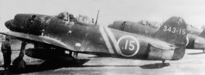 菅野直の愛機、紫電21改343・A15機